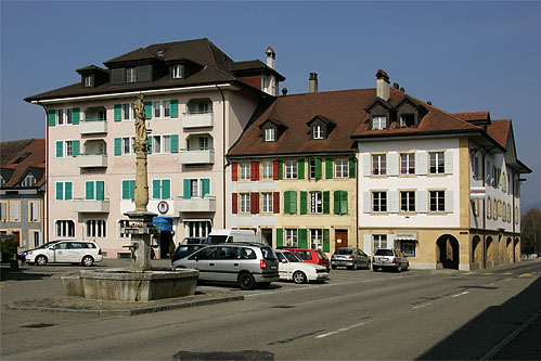 Cudrefin: centre-ville avec la fontaine de la justice